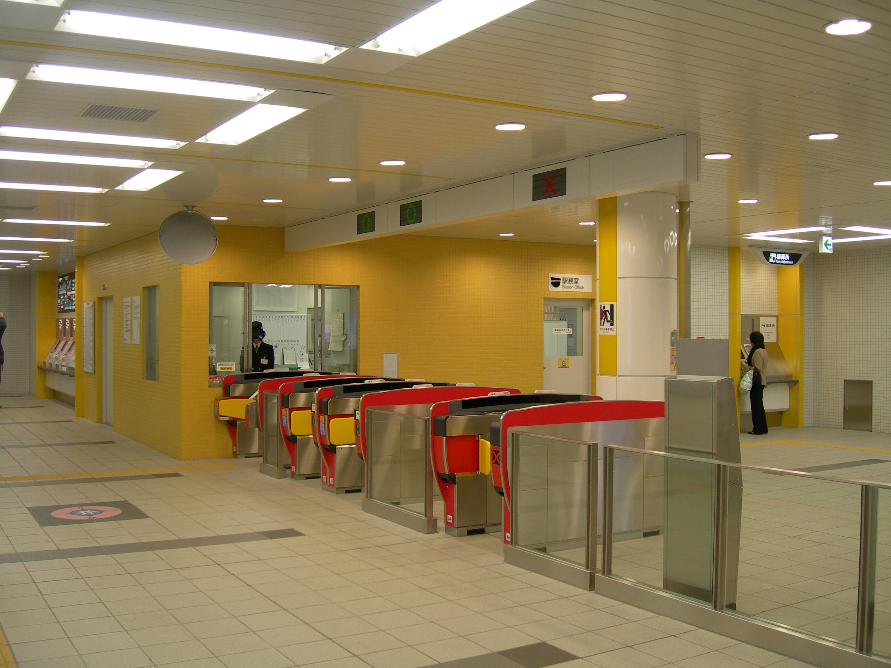 京都市営地下鉄東西線西大路御池駅改札口